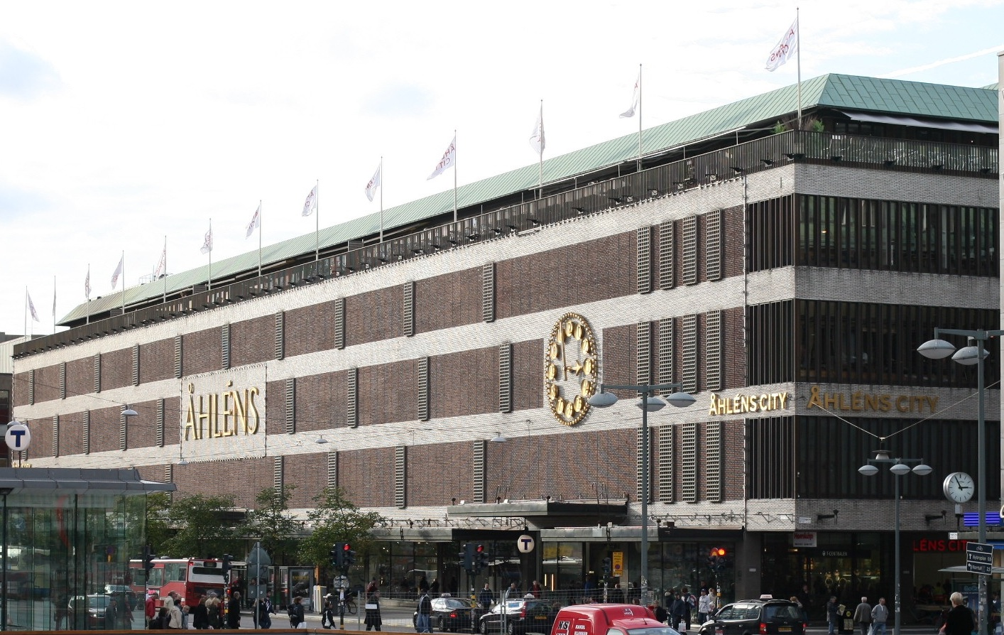 Varuhuset Åhléns City i Stockholm